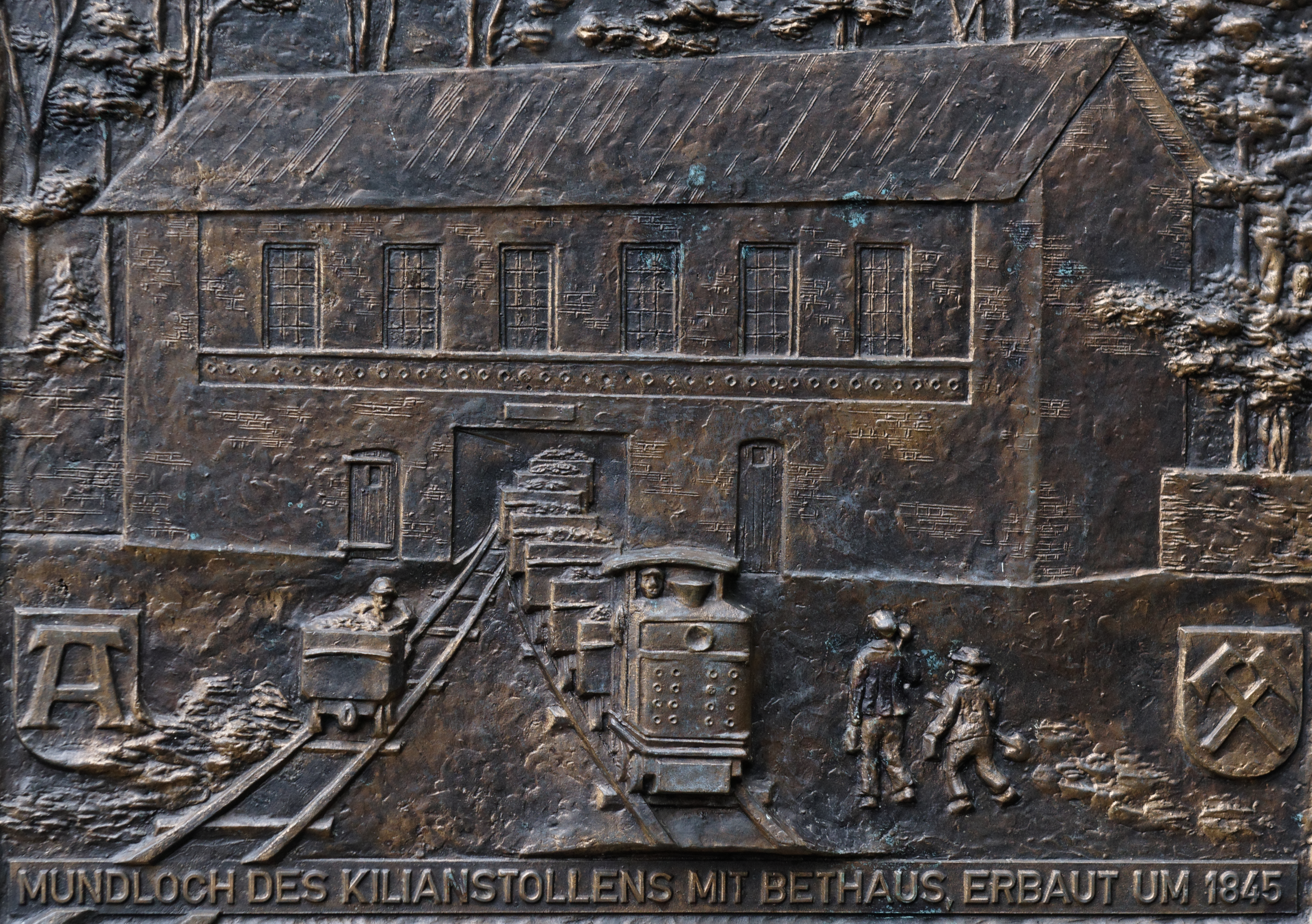 Gedenktafel am Eingang des Kilianstollen